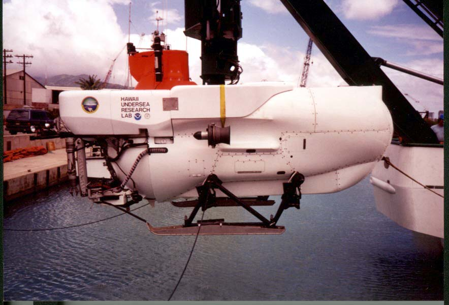 US-Forschungs-U-Boot Pisces IV wird von ihrem Versorgungsschiff R/V Ka?imikai-o-Kanaloa herabgelassen